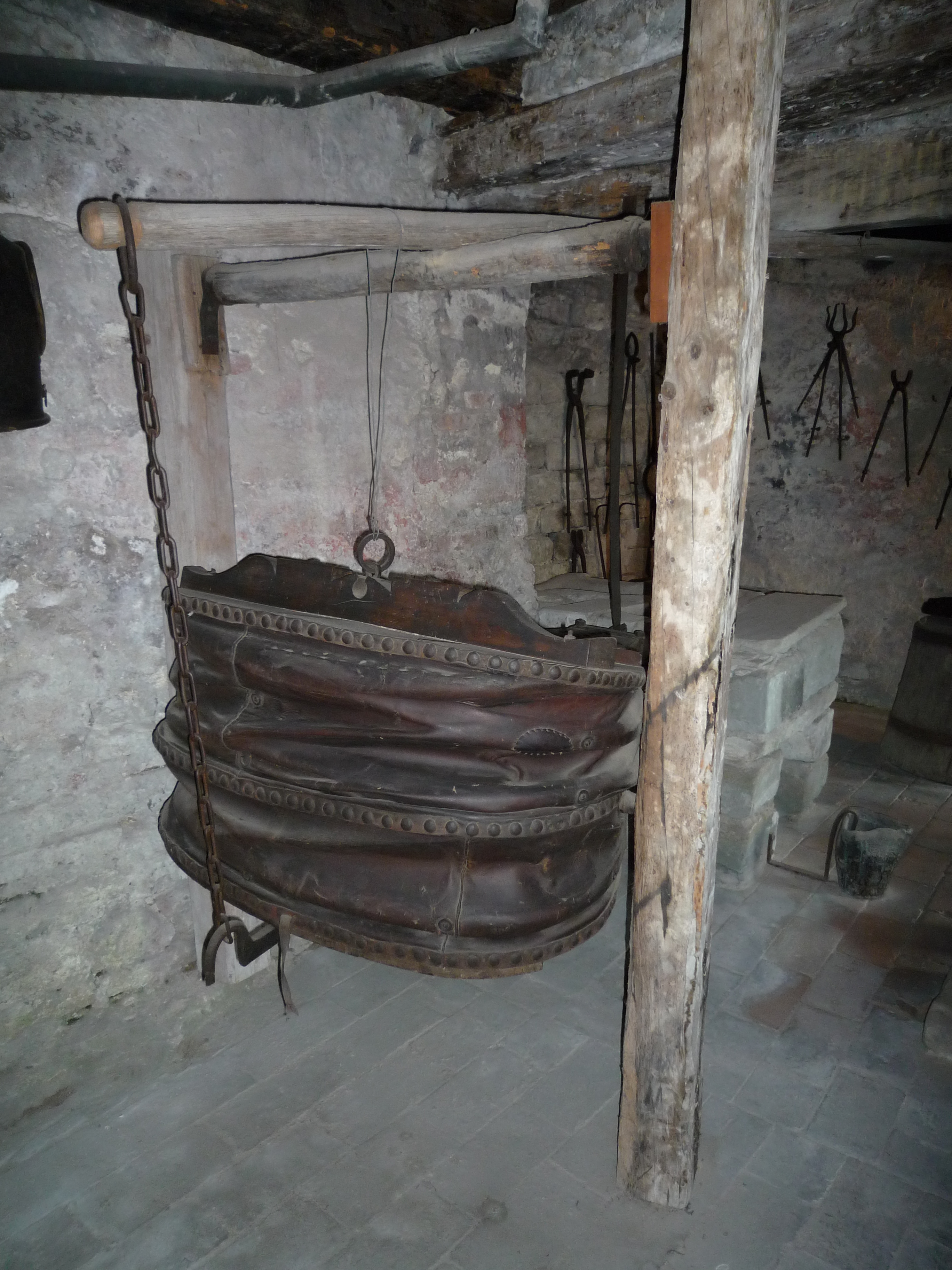 Blasebalg in der Burg Meersburg